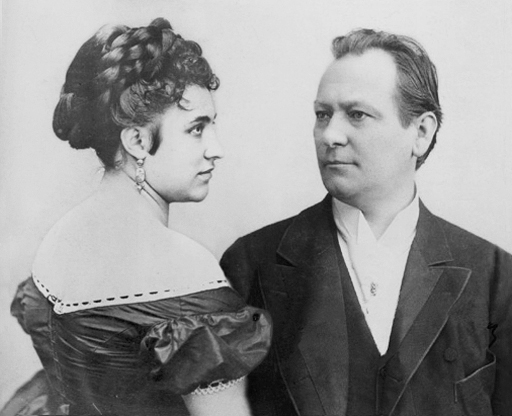 Amalie Friedrich-Materna und Hermann Winkelmann, die Wiener Premierenbesetzung von Tristan und Isolde.